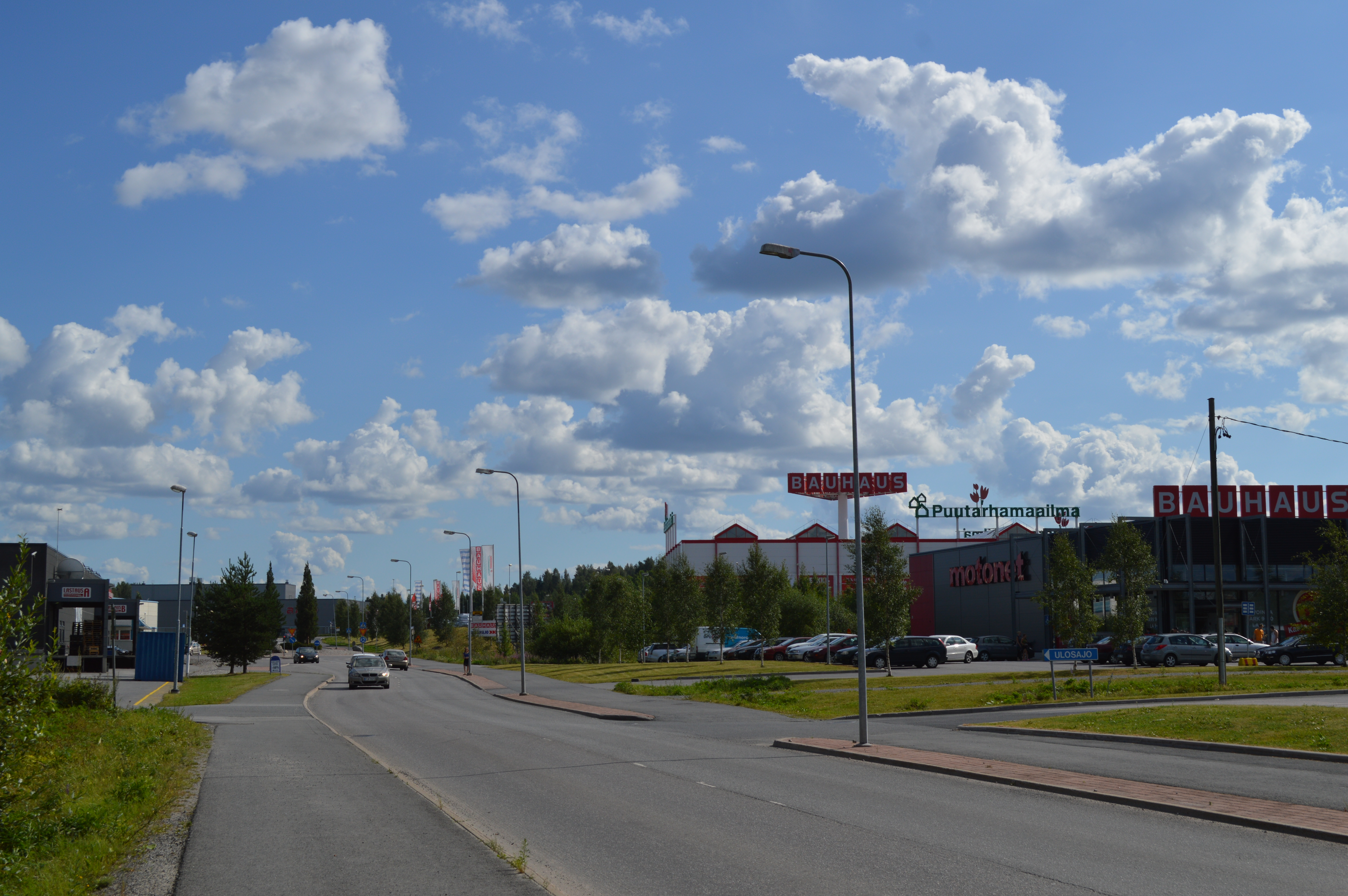 Partola